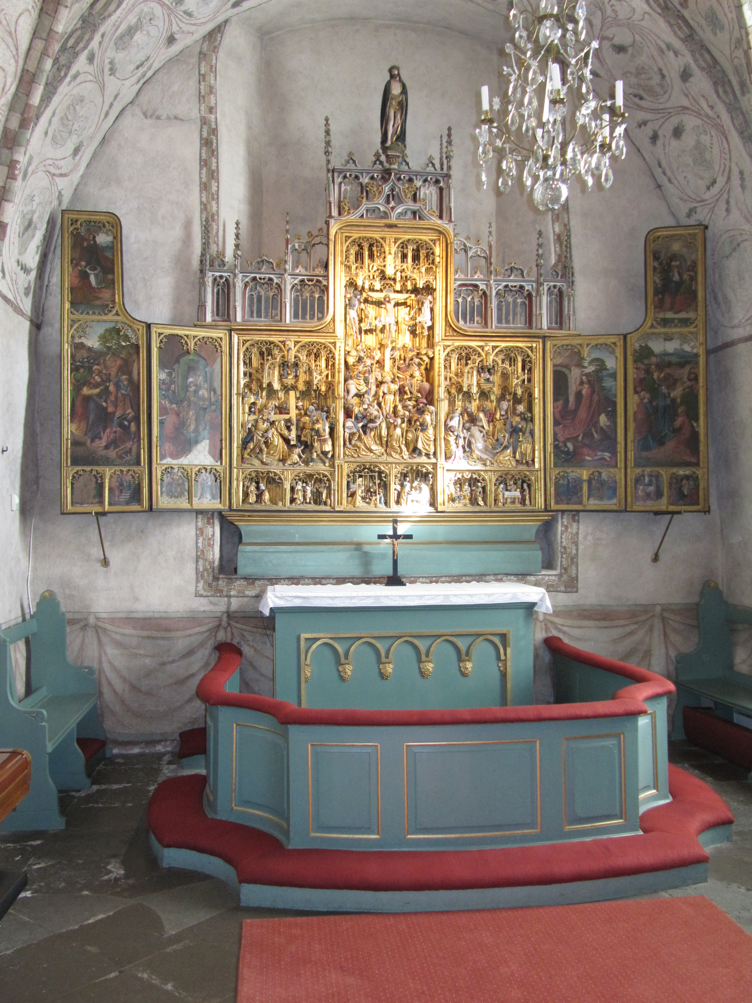 Kor och altare i Villberga kyrka